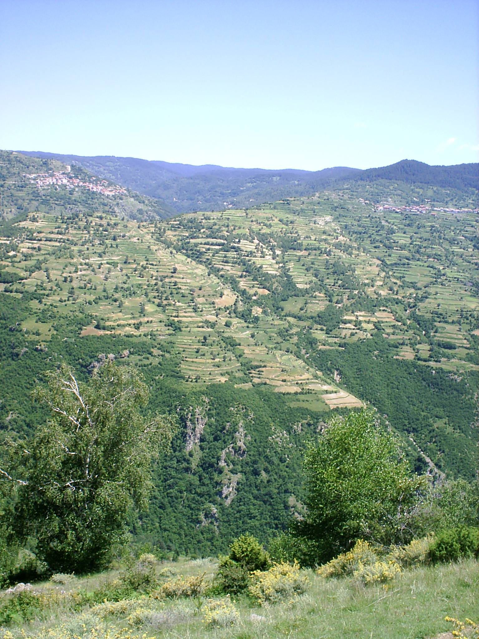 Бръщен и Црънча